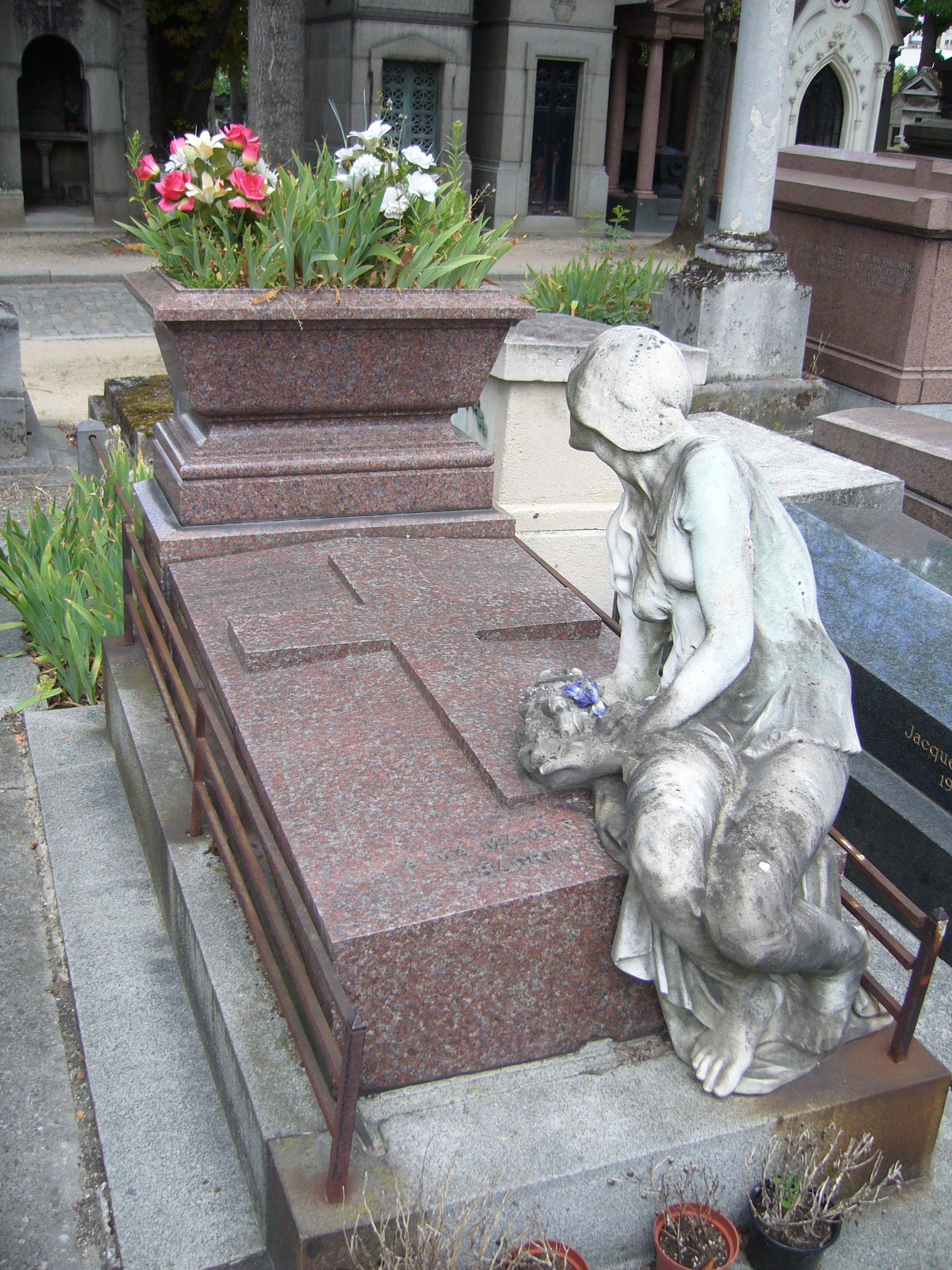 Tombe de la comédienne belge Cléo de Mérode au cimetière du Père Lachaise à Paris.